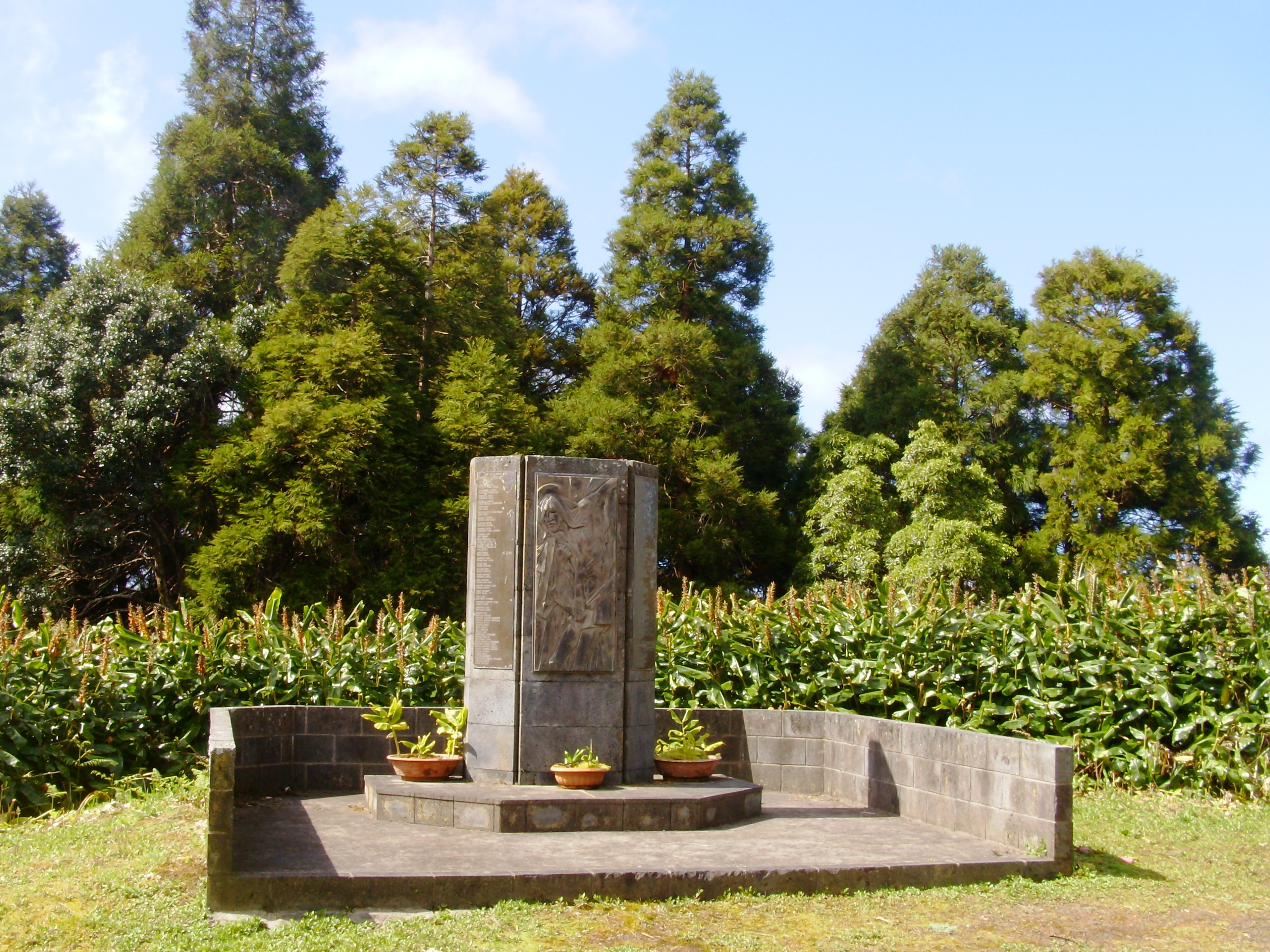 Monumento aos mortos do vôo 1851 da Independent Air no Pico Alto, freguesia de Santa Bárbara, concelho de Vila do Porto, ilha de Santa Maria, Açores.